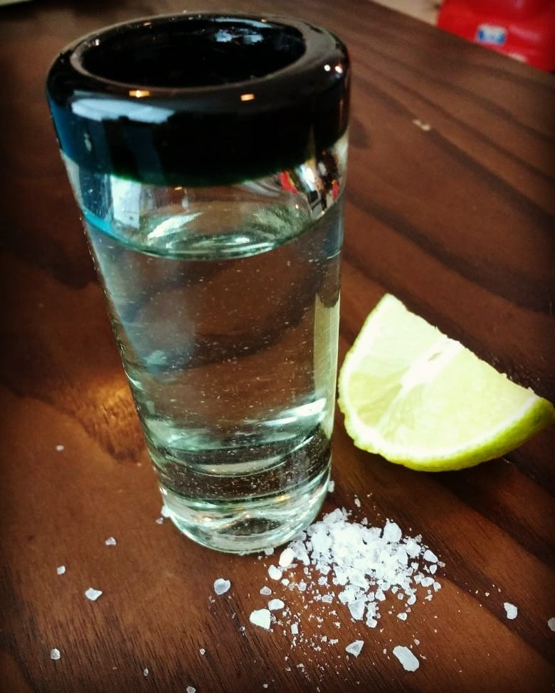 Caballito con tequila Tierra Mexicana